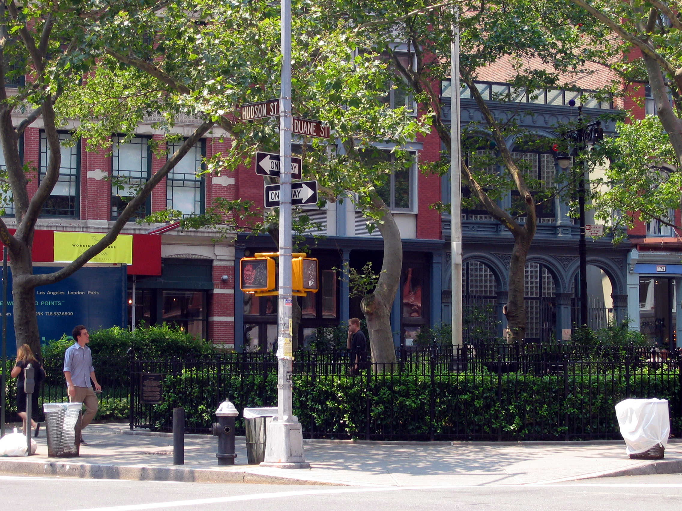 Duane Park in TriBeCa.